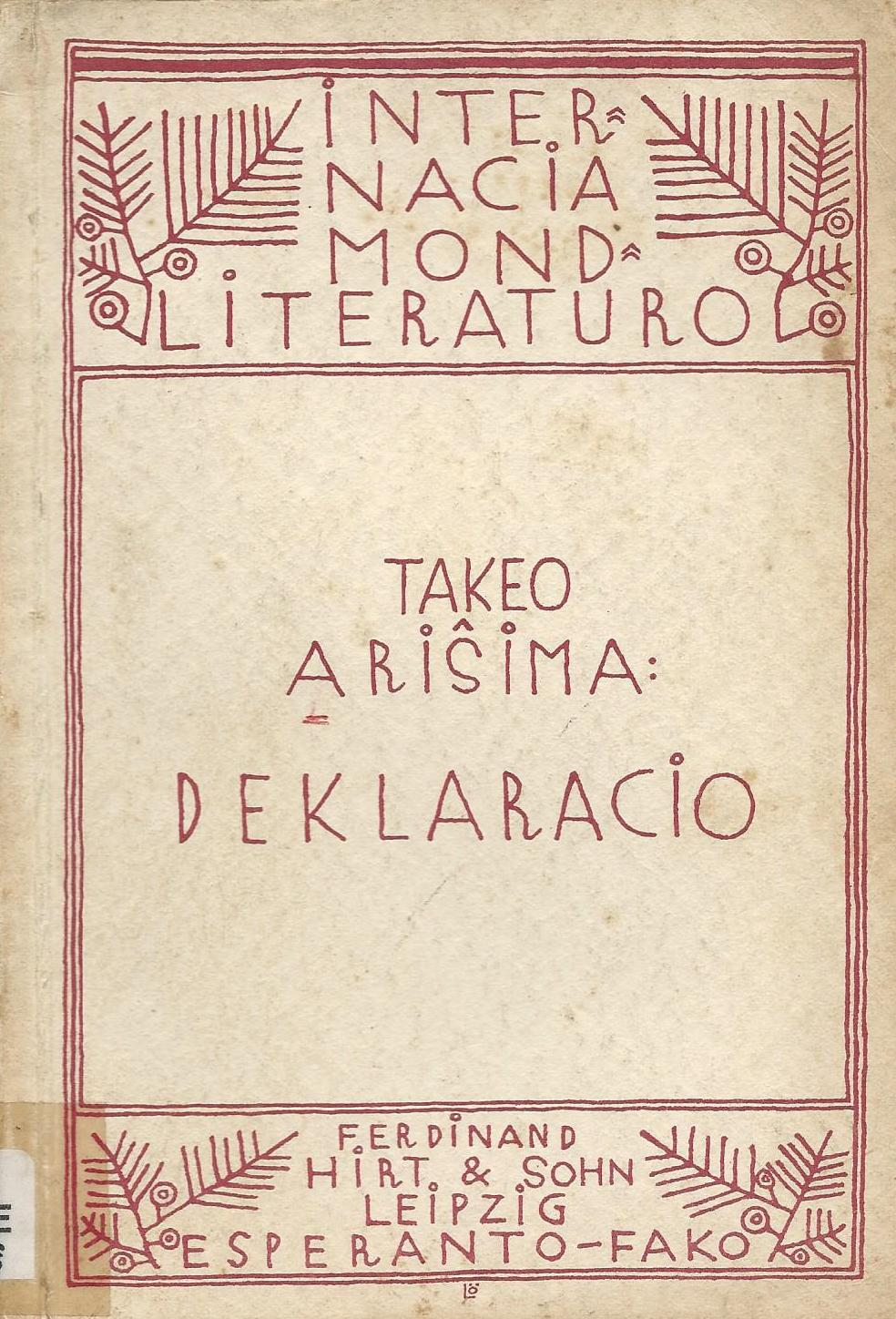 librokovrilo de "Deklaracio", 1924